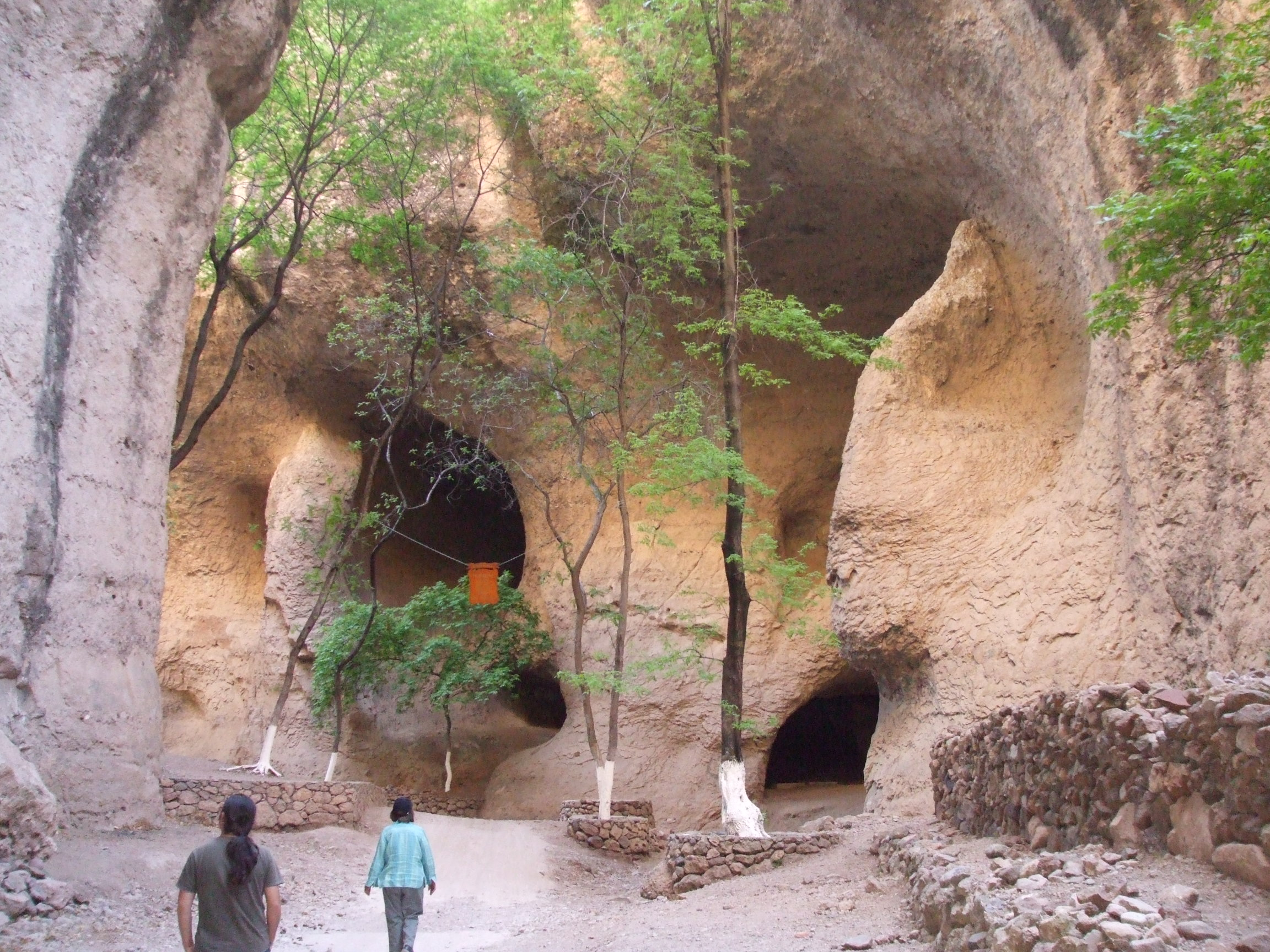 Namurachi Canyon, Chihuahua, Mexico